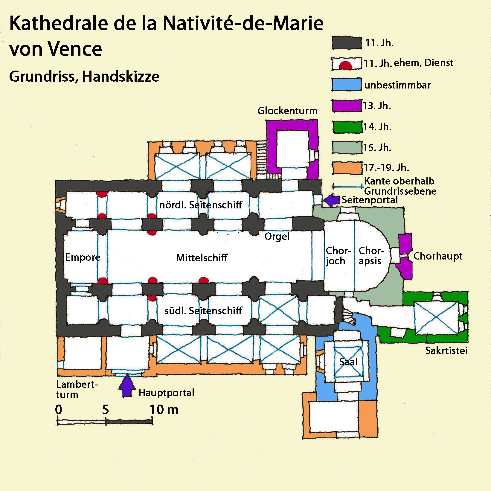 Kathedrale von Venced, Grundriss, Handskizze